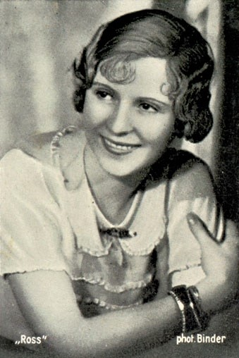 Josette Day